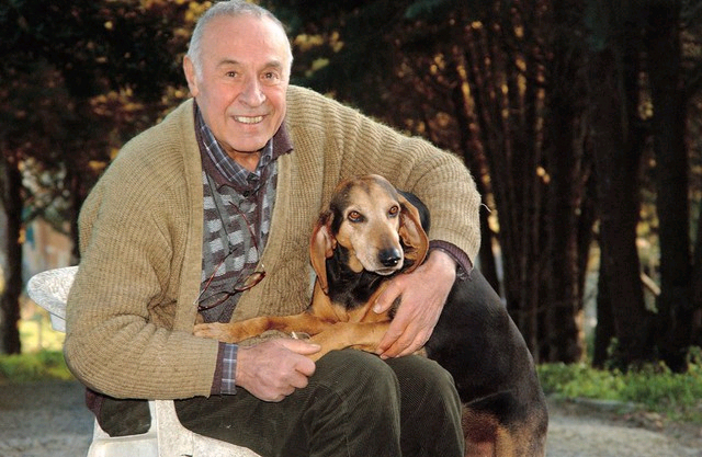 Luigi Cascioli con il suo cane Pluto.